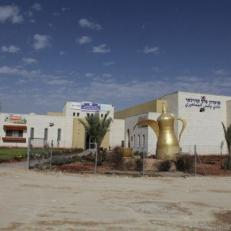 ביה"ס ומתנ"ס בחורה